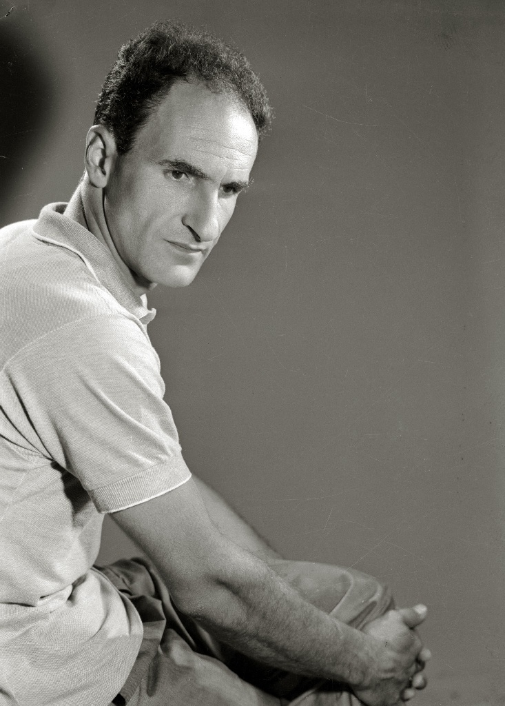 Título original: El escultor donostiarra Eduardo Chillida (2/2) Localización: Guipúzcoa